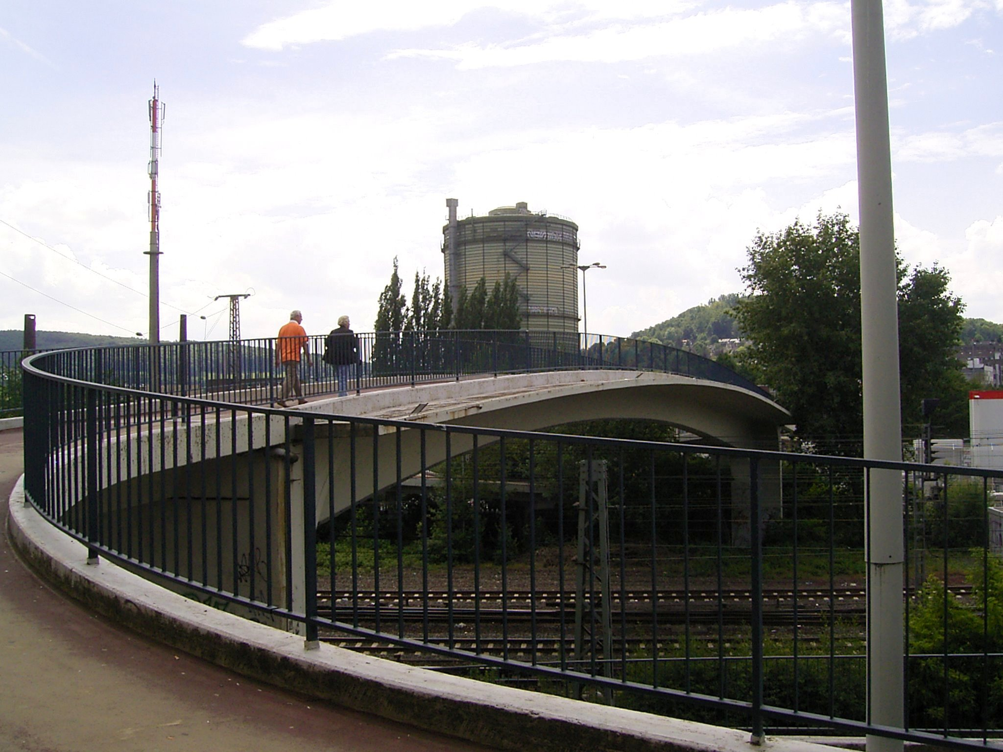 Rittershausener Brücke über die Wupper in Wuppertal